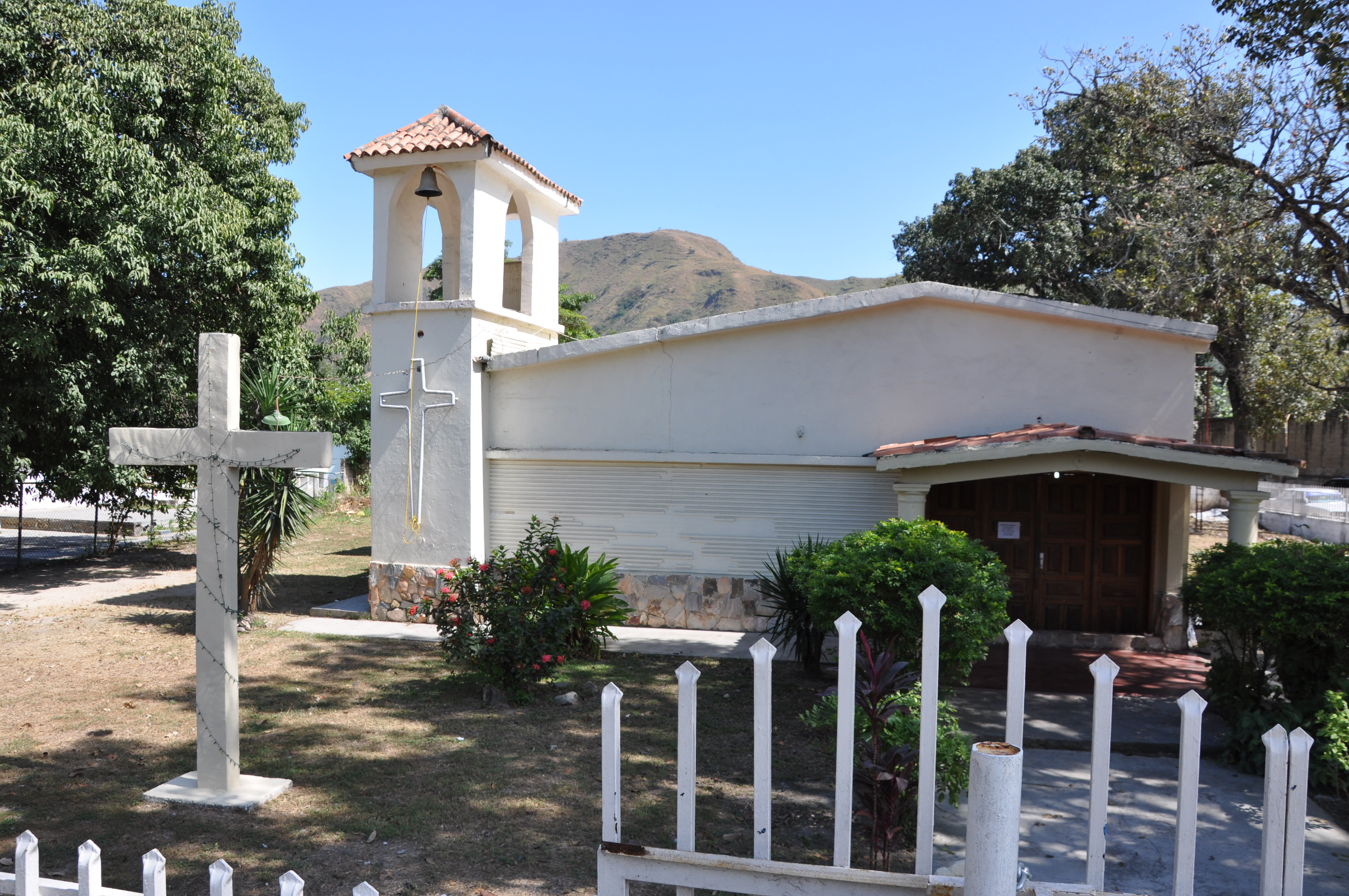 Esta iglesia se encuentra en la vía Vigirima, Municipio de Guacara (estado Carabobo, Venezuela).